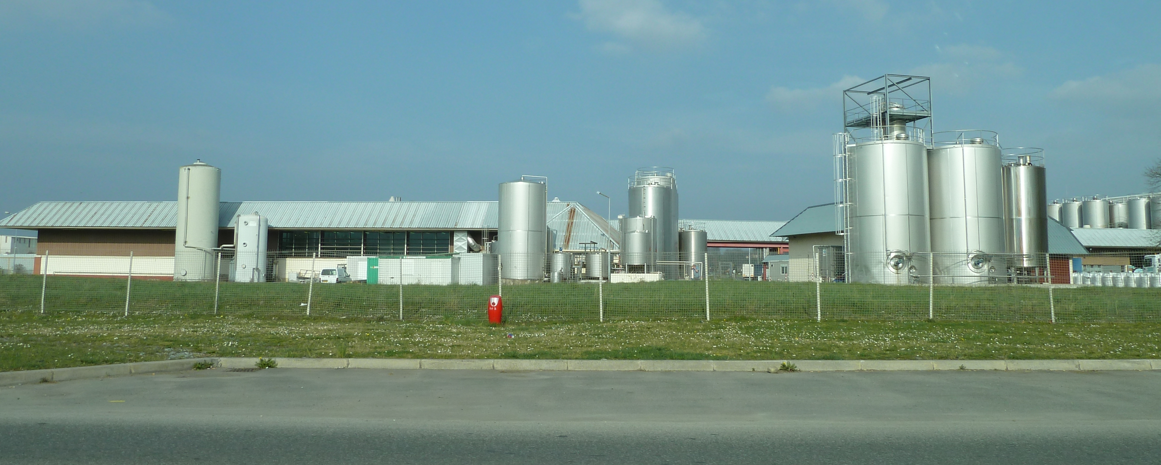 Usine 3A de Lons (produits laitiers ...)